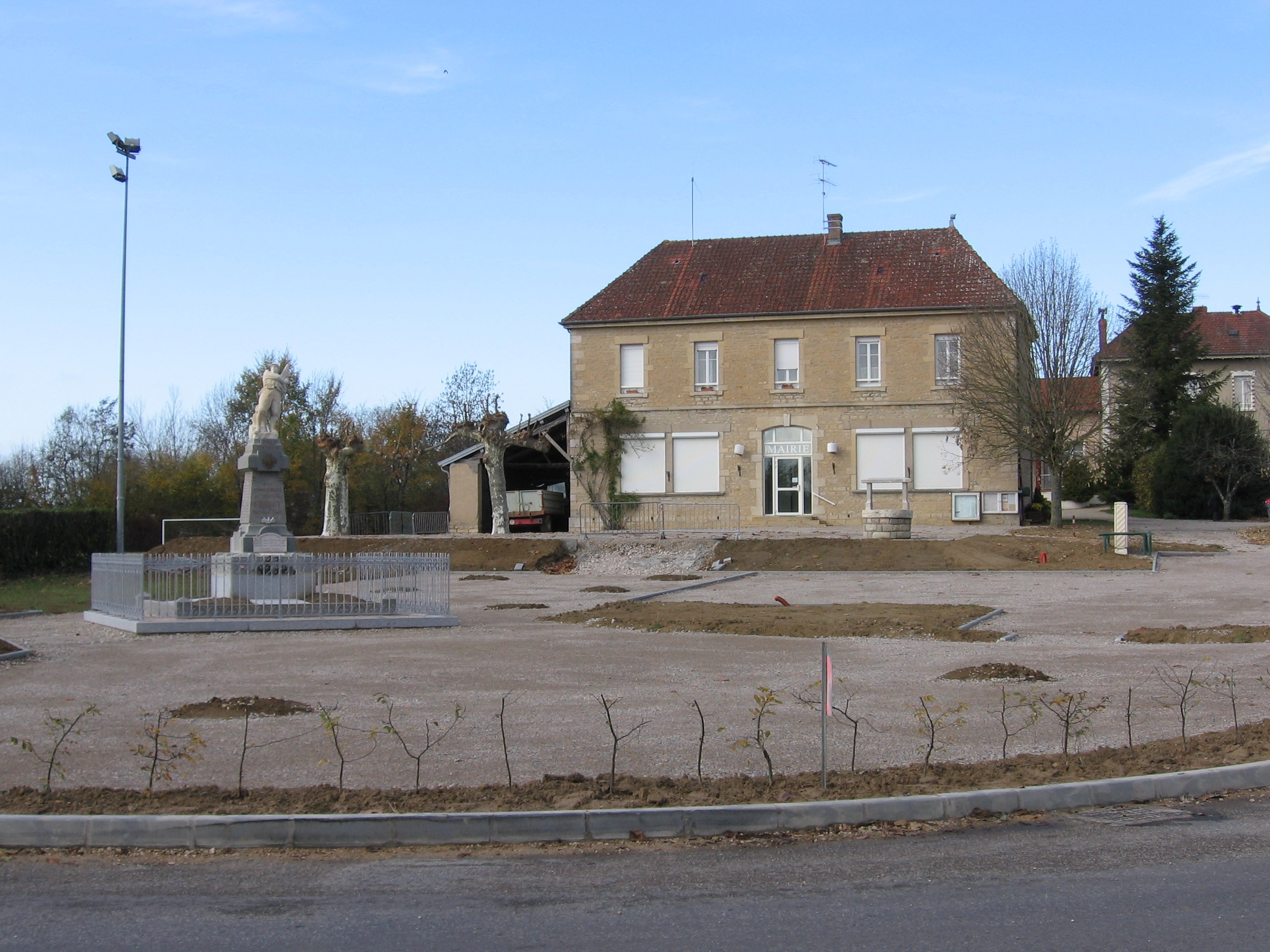 Mairie en oorlogsmonument Frangy en Brsse